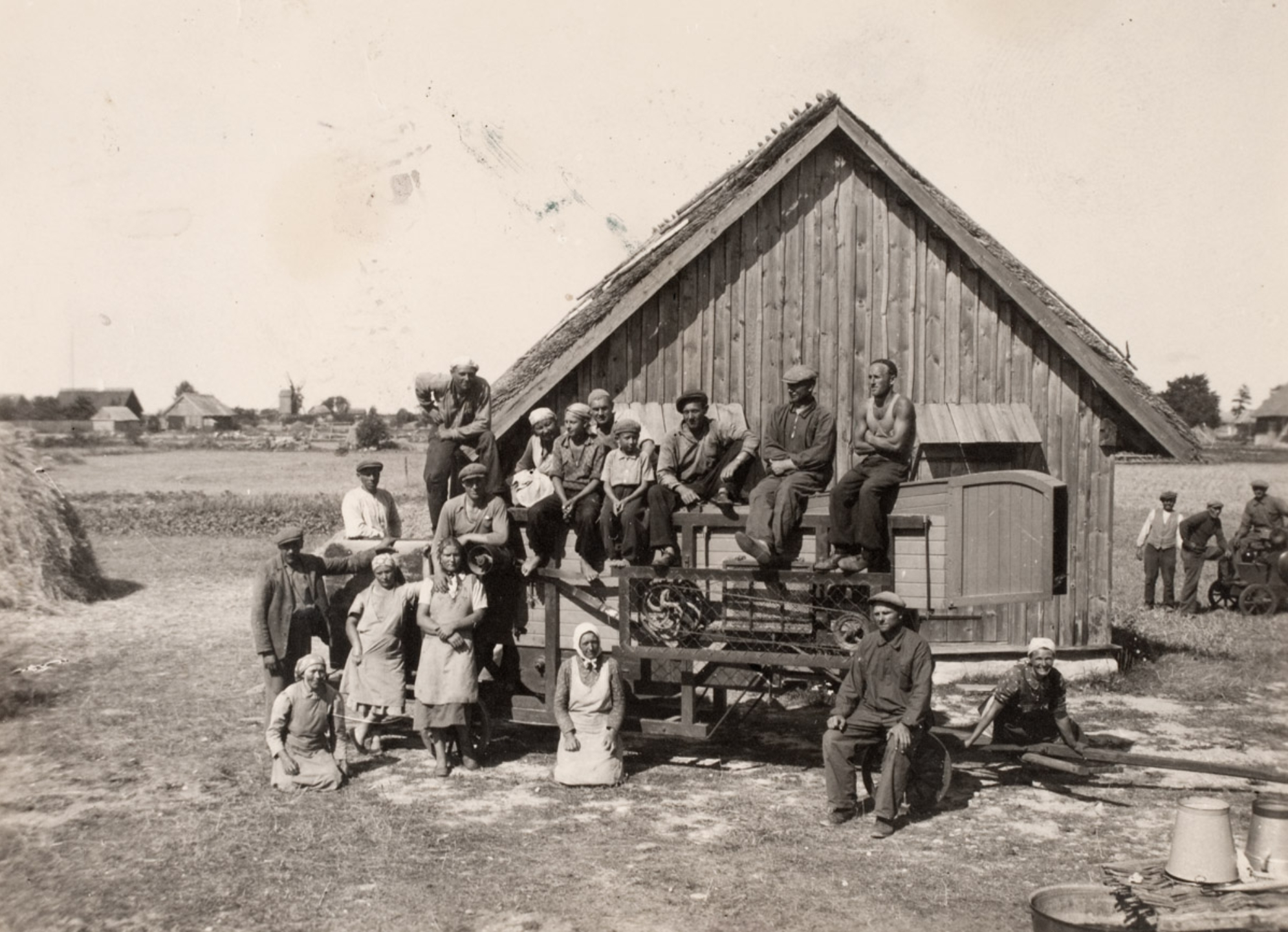 Rehepeks Abrukal, Põllu talu õuel